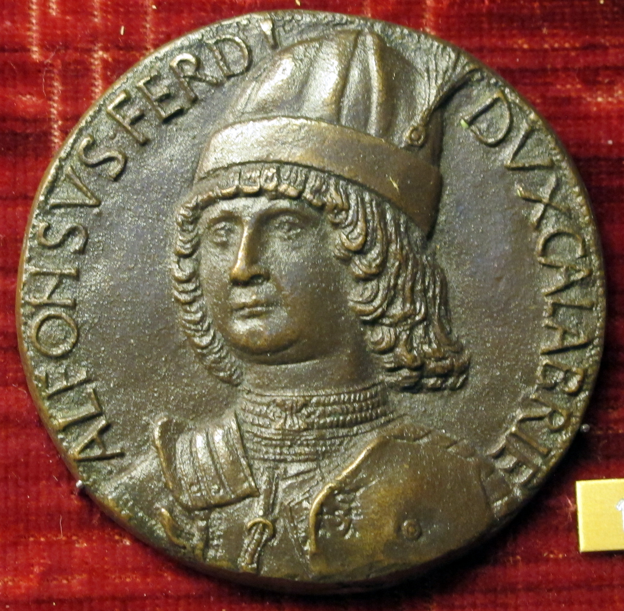 Medaglia di alfonso d'aragona, duca di calabria, 1481